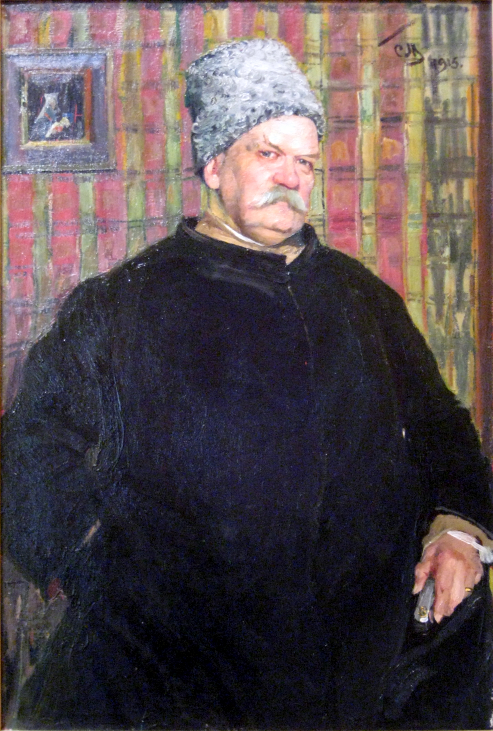 «Король репортёров», портрет Владимира Гиляровского работы С. Малютина